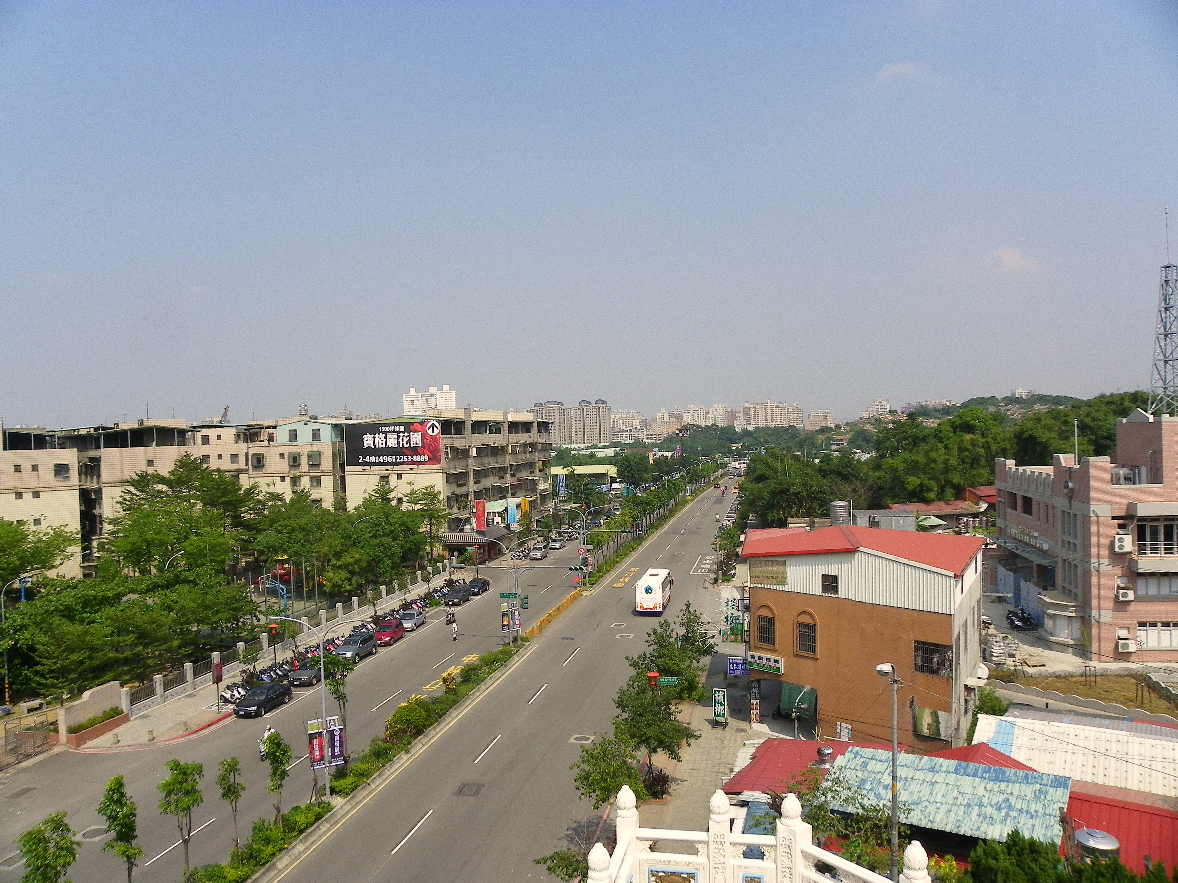 自廣承岩寺5樓俯望東北方金城路二段與土城市街。